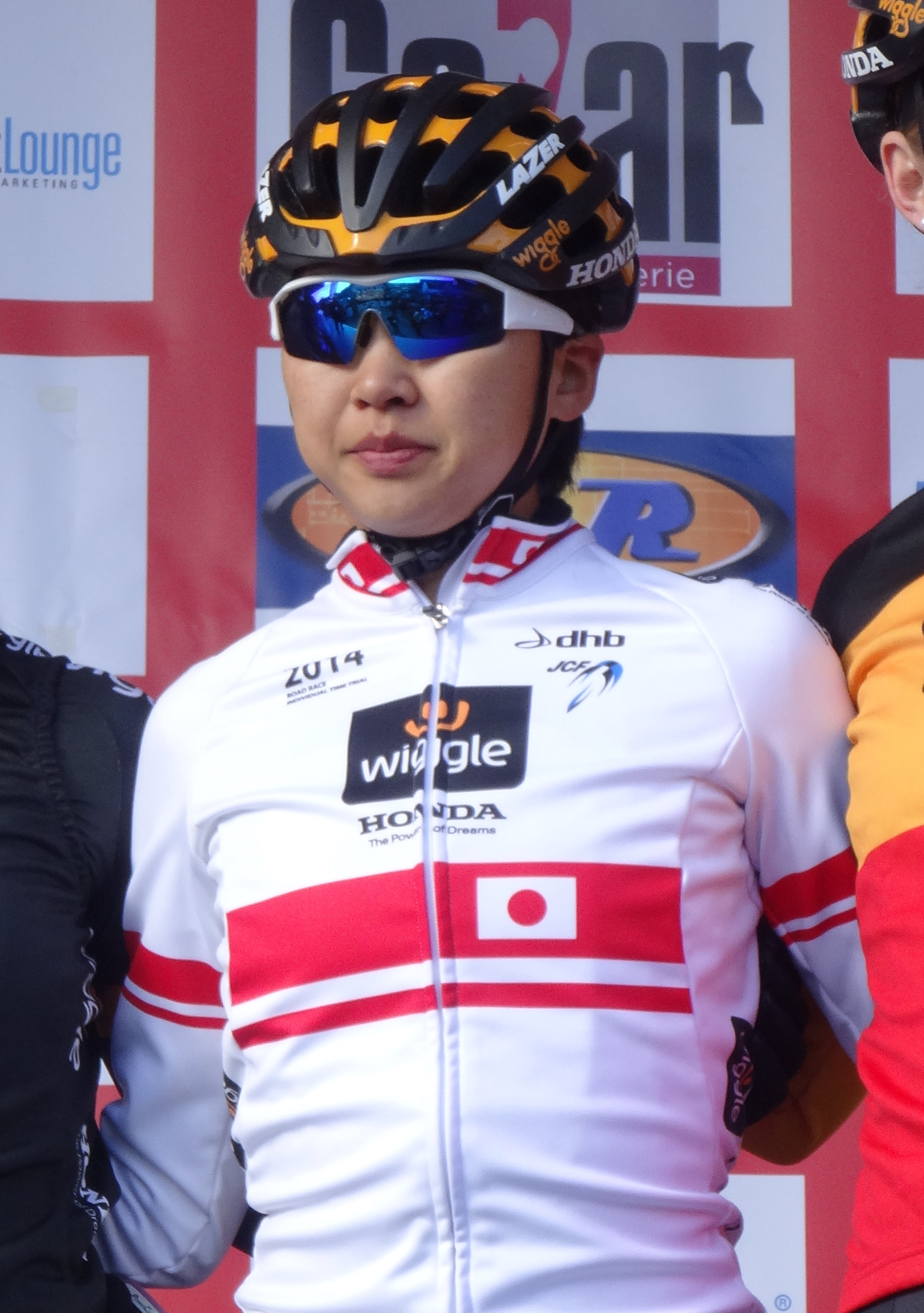 Reportage réalisé le mercredi 4 mars à l'occasion du départ du Samyn des Dames 2015 et du Samyn 2015 à Quaregnon, Belgique.